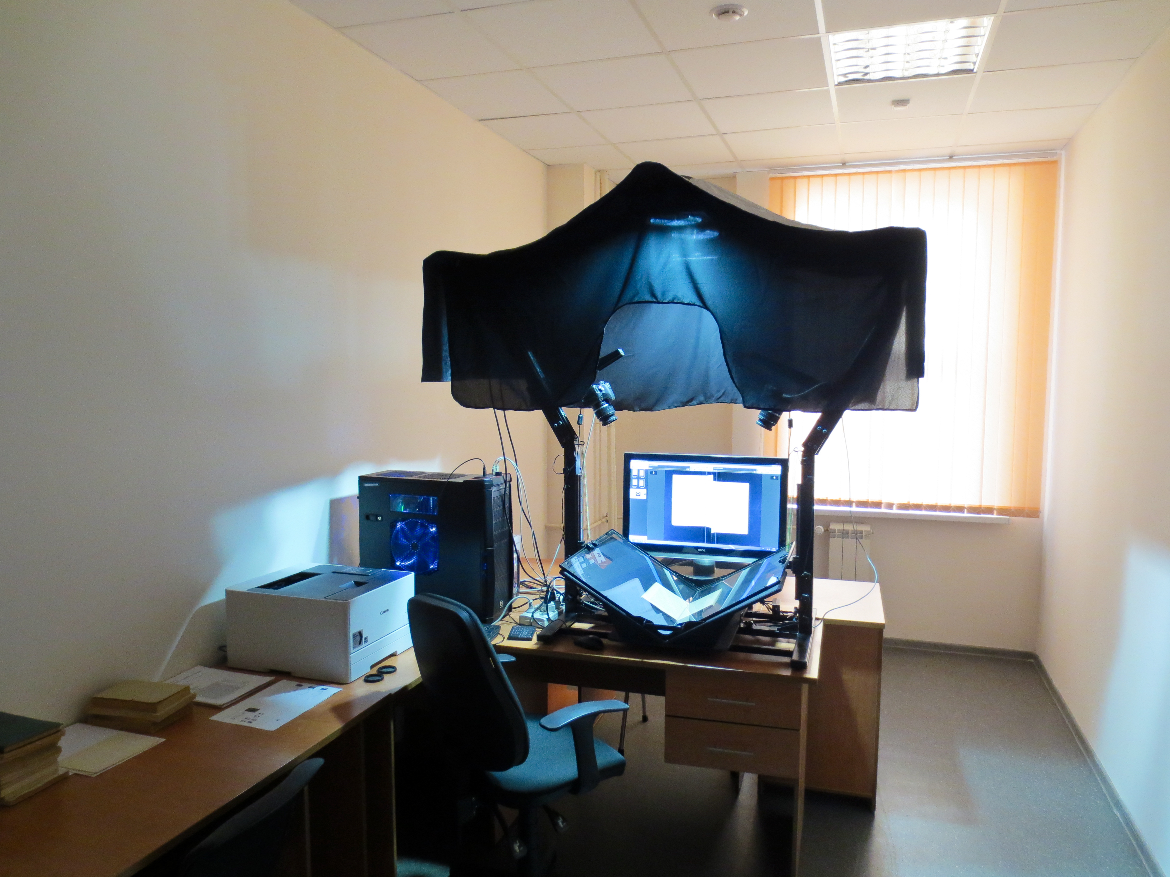 Сектор сканирования Научной библиотеки Курского государственного университета